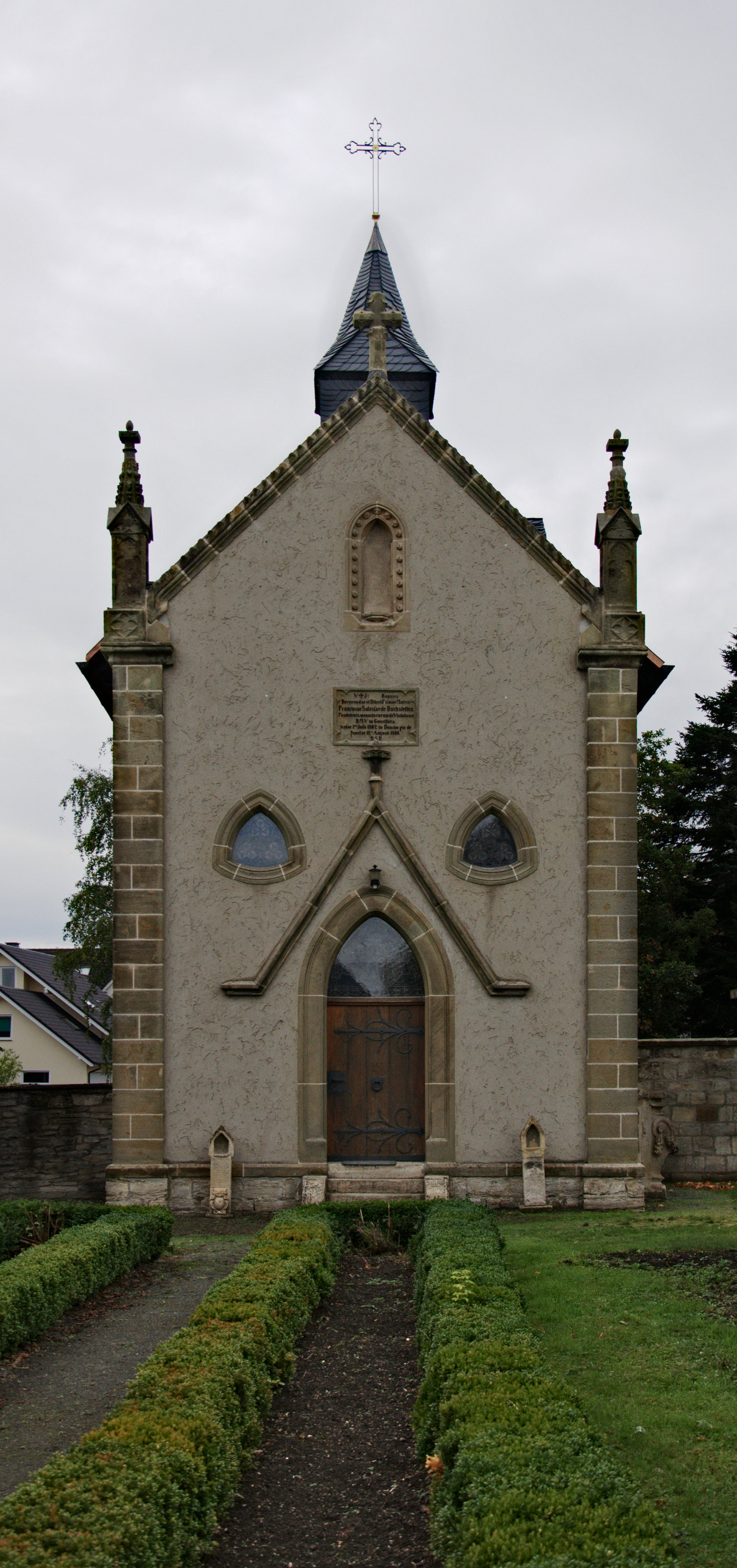 Kapelle auf dem Schwesternfriedhof der Ordenskommende Mülheim